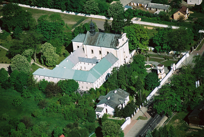 Zdjęcie lotnicze - kościół w miejscowości Siennica (powiat miński)